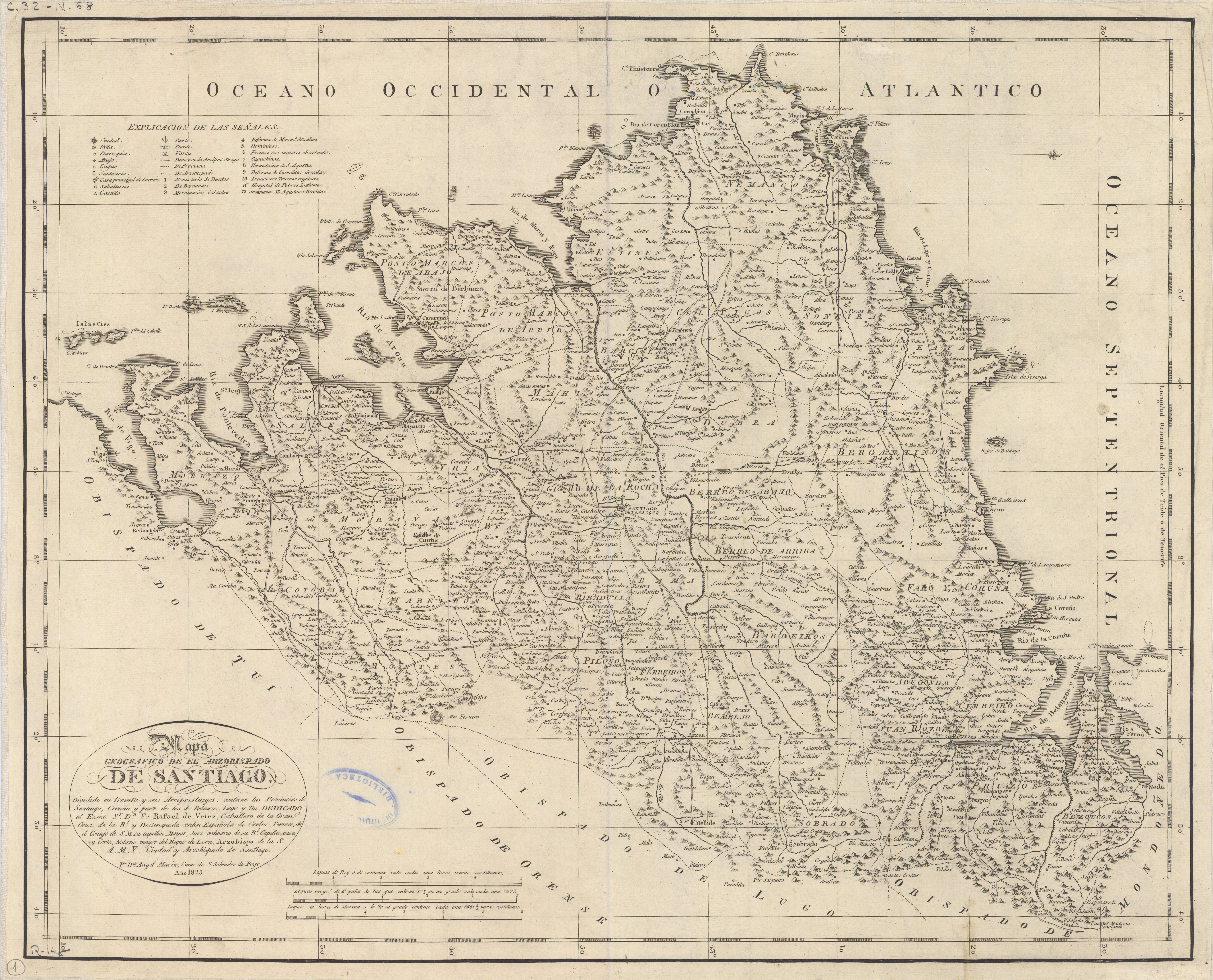 Mapa do arcebispado de Santiago de Compostela realizado por Angel Marin, cura de S. Salvador de Poio.